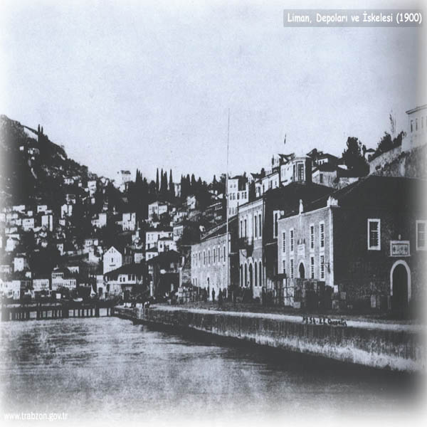 Eski Sinop kenti.